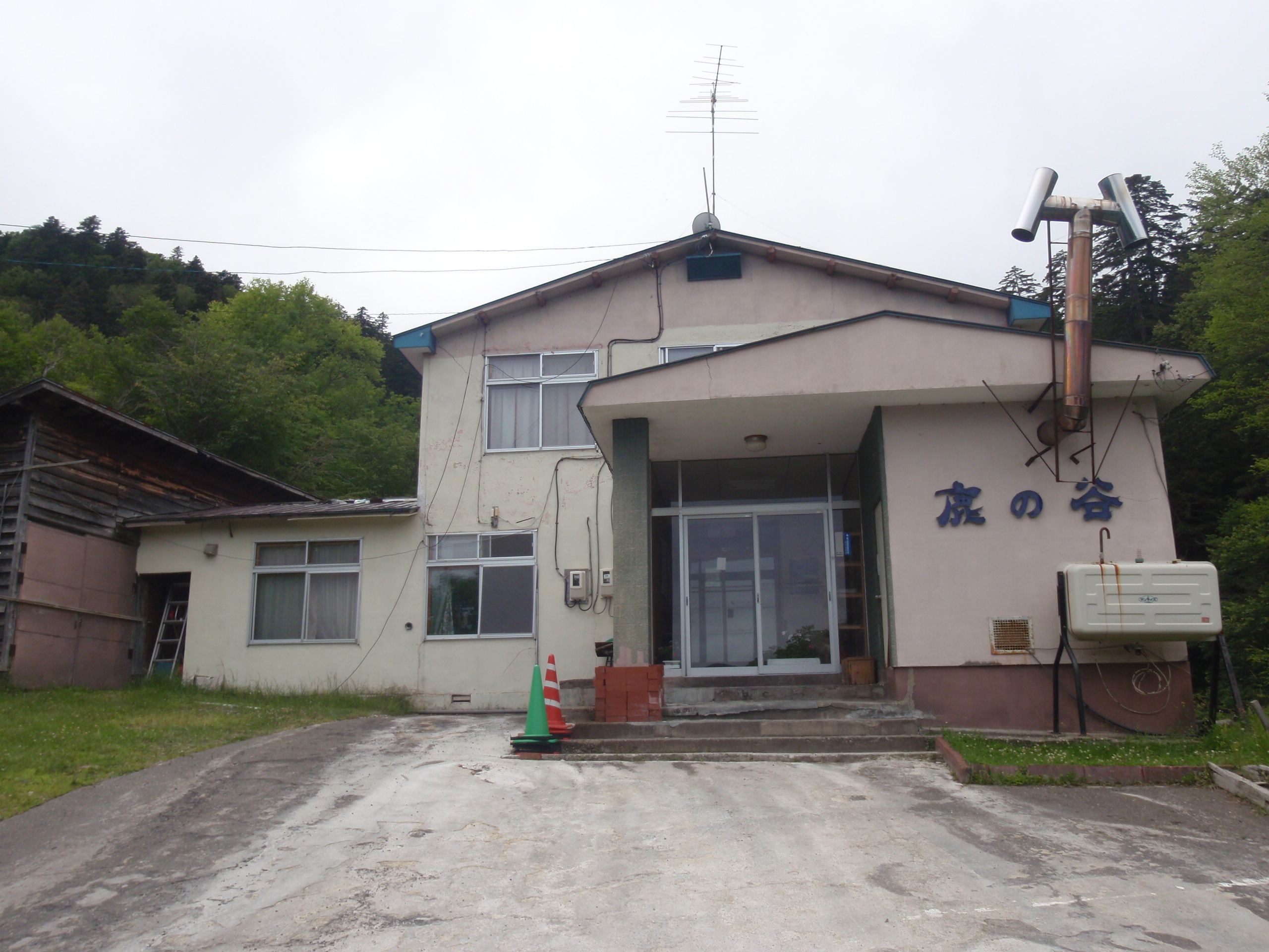 幌加温泉、鹿の谷